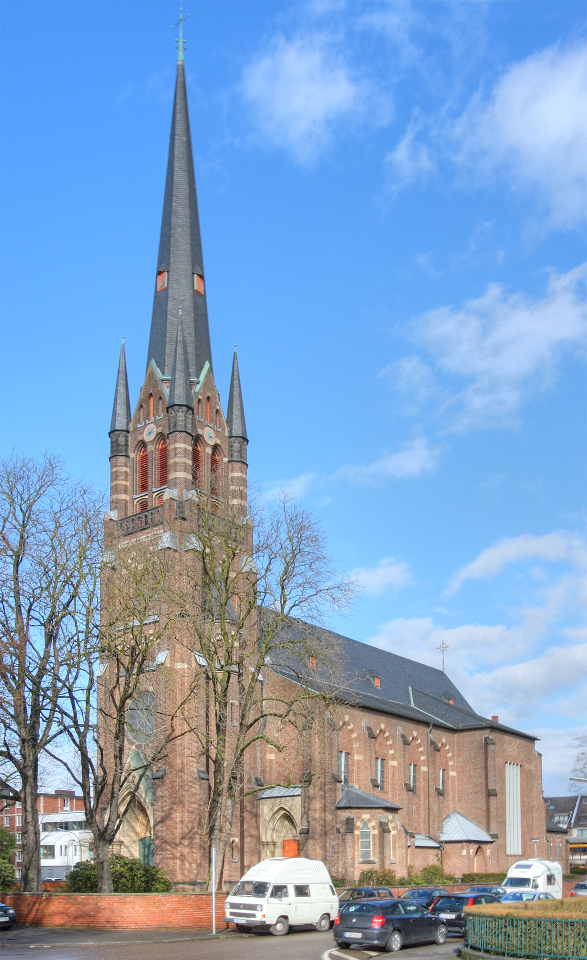 Kirche St. Matthias in Köln-Bayenthal. Architekt: Dominikus Böhm (Wiederaufbau und Innenraum) This is a photograph of an architectural monument.